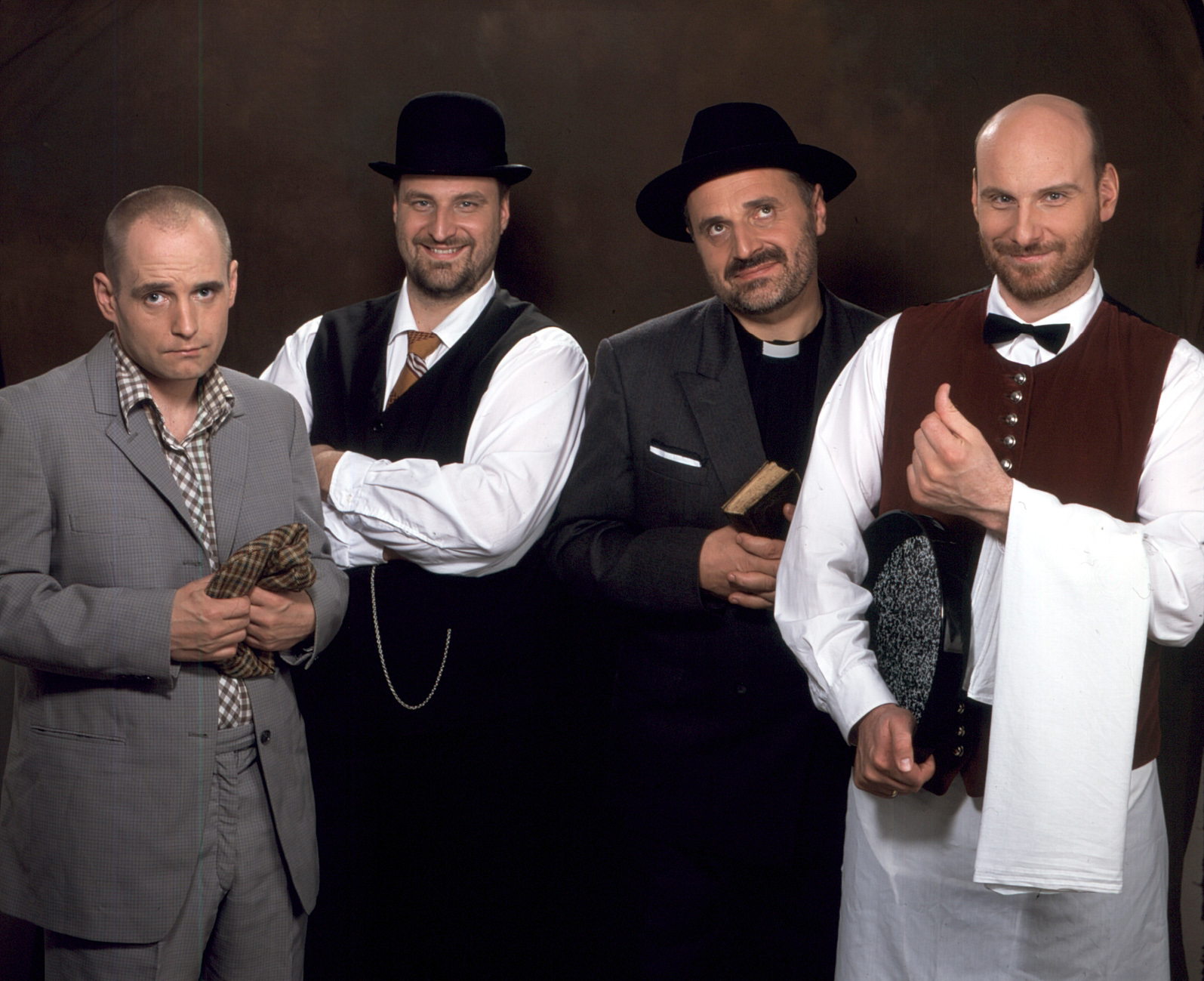 27. avgust 2003 - Frajkinclarji